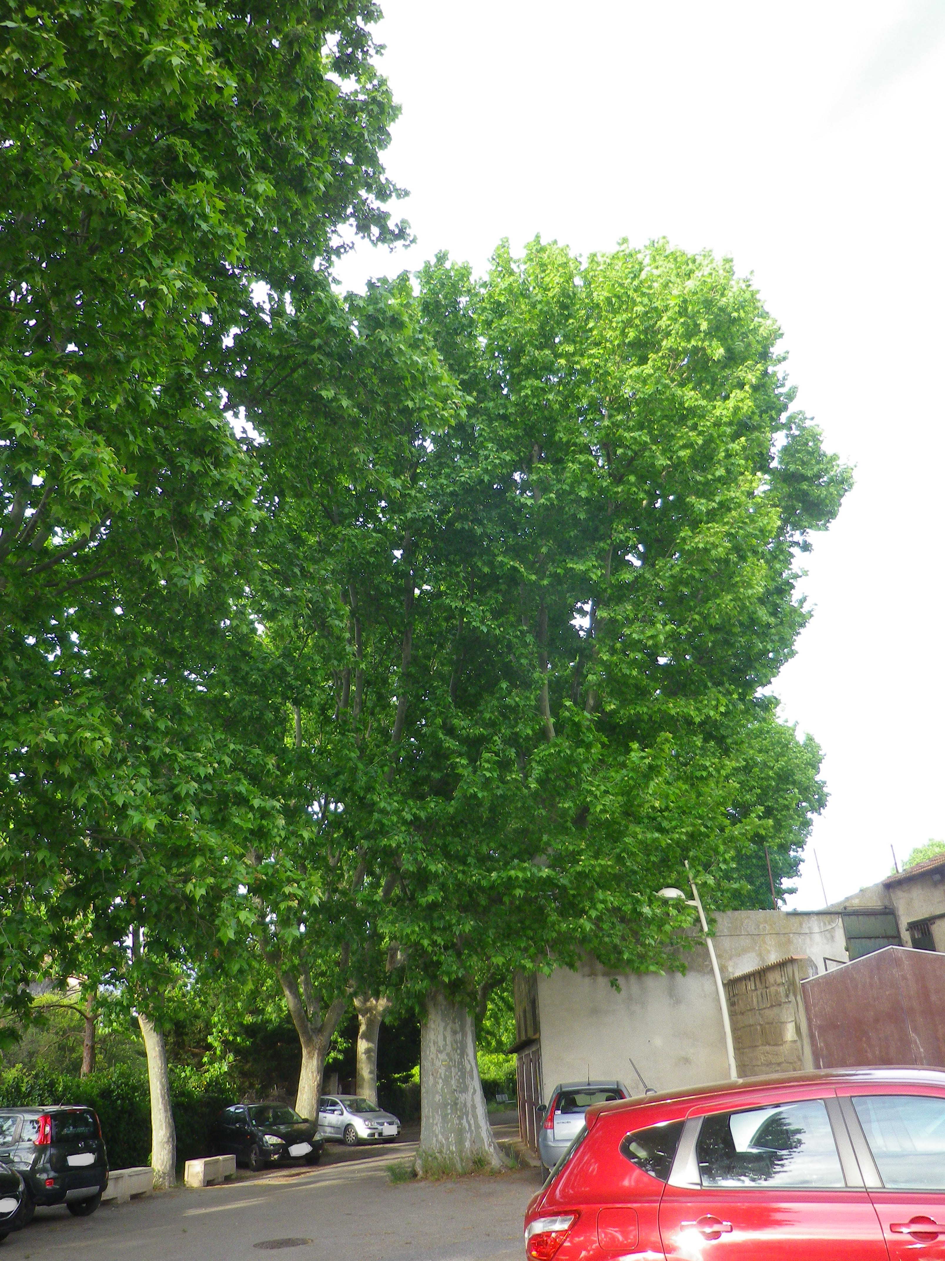 Sujet âgé début mai